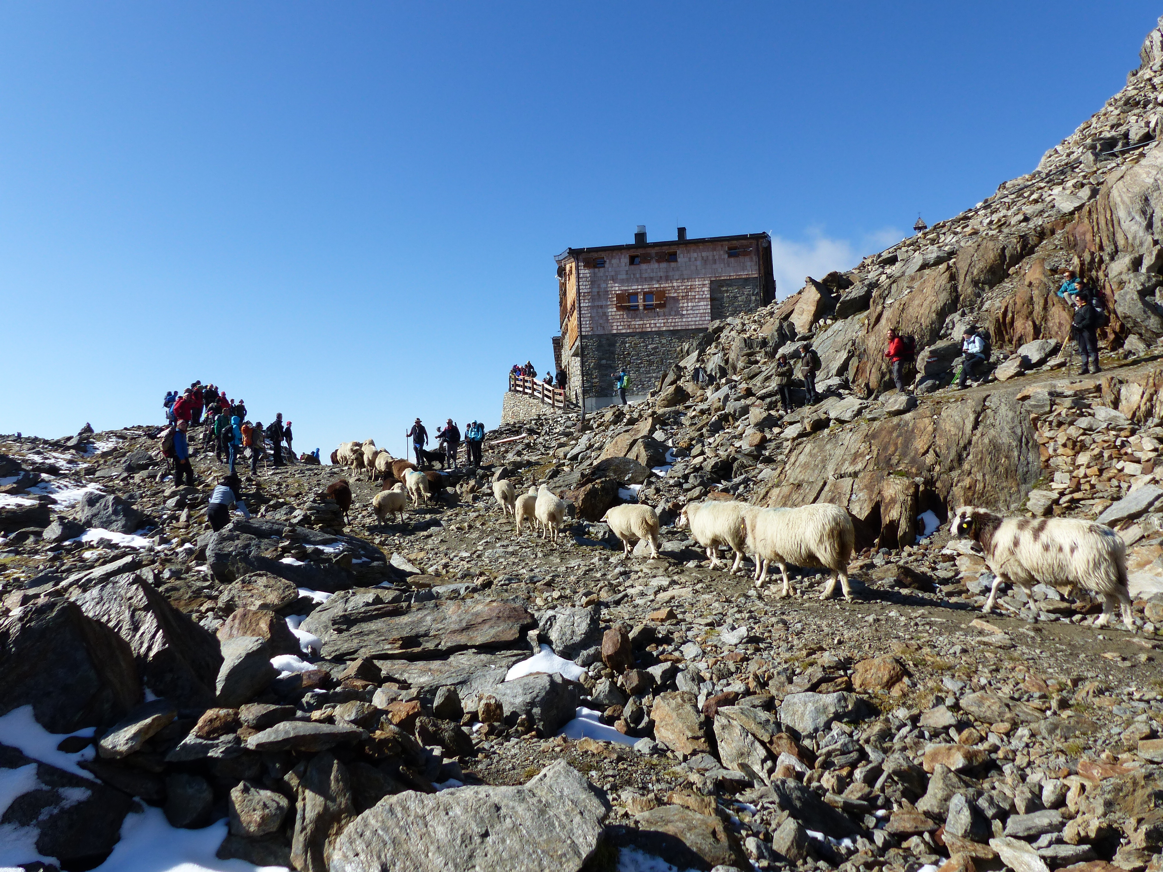 Schaftrieb ins Schnalstal kurz vor dem Niederjoch mit Similaunhütte